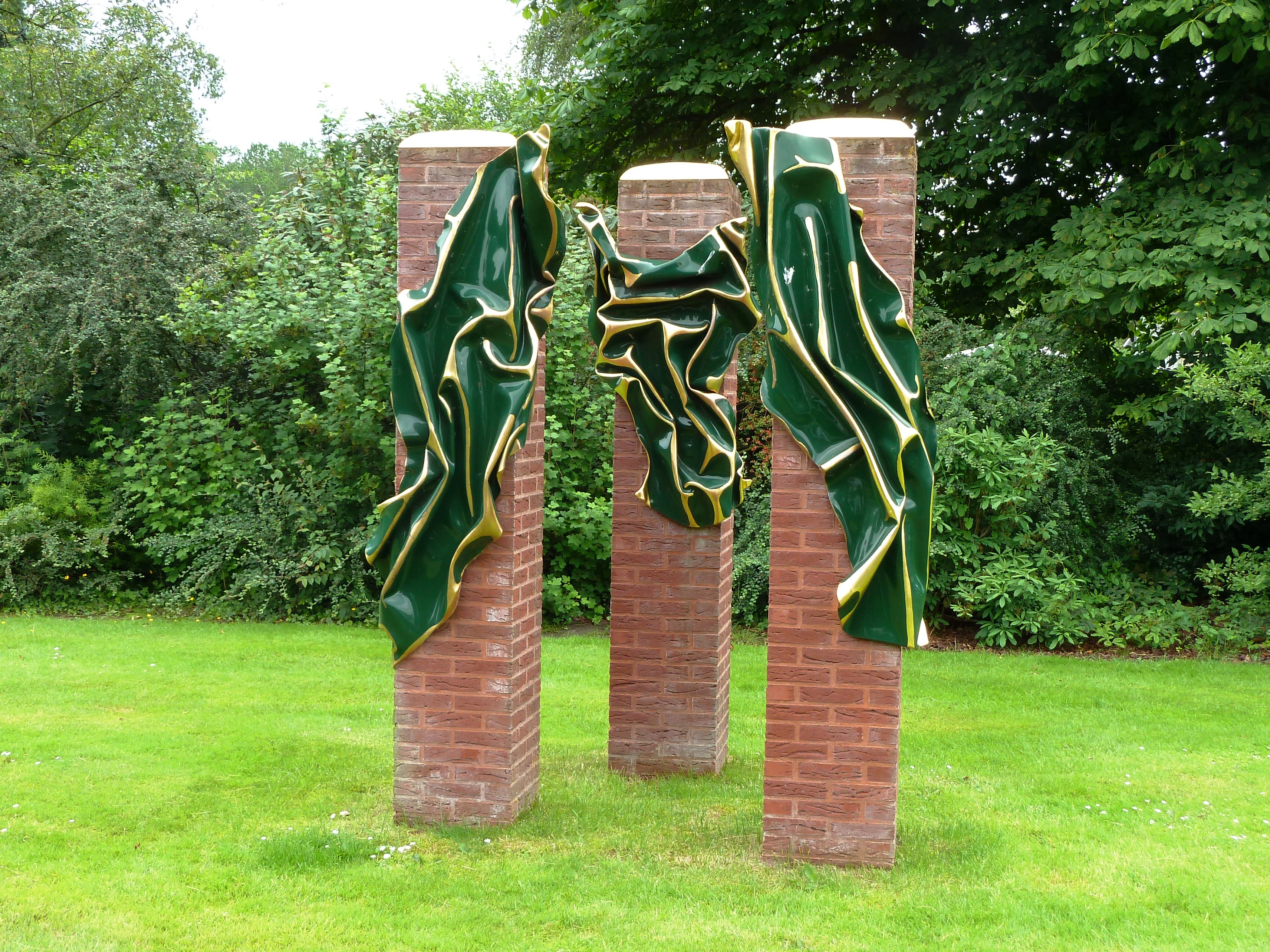 Monument ter herinnering aan Groot Bronswijk in Wagenborgen (Delfzijl, Groningen, Nederland). Gemaakt door Marte Röling in 2004.